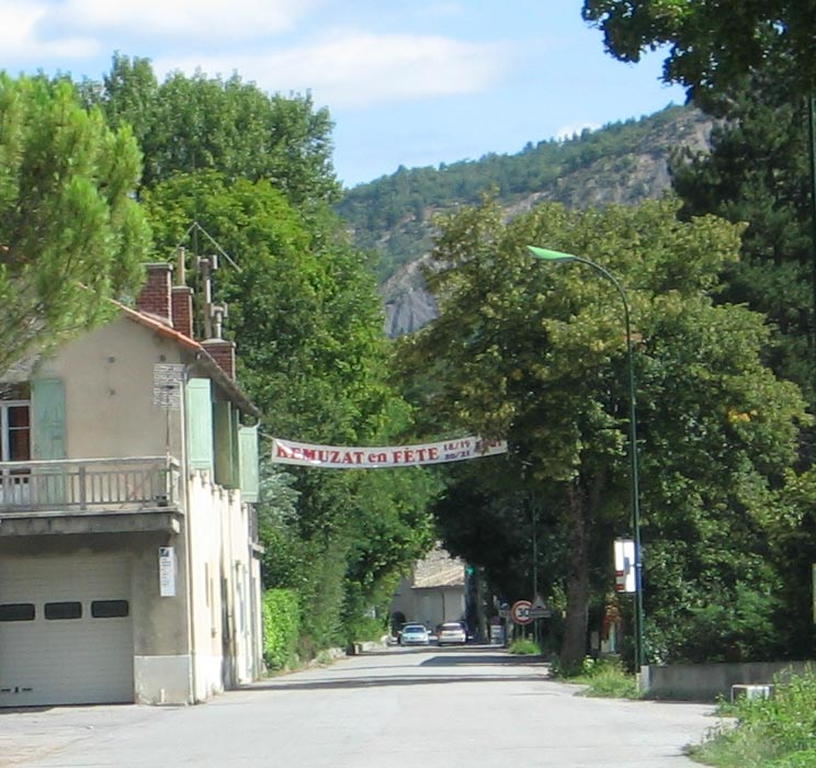 Remuzat, France